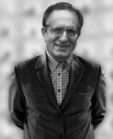 Ernesto_balducci.jpg. Foto scattata a Cagliari nel 1992. Autore: Matzuyagi.